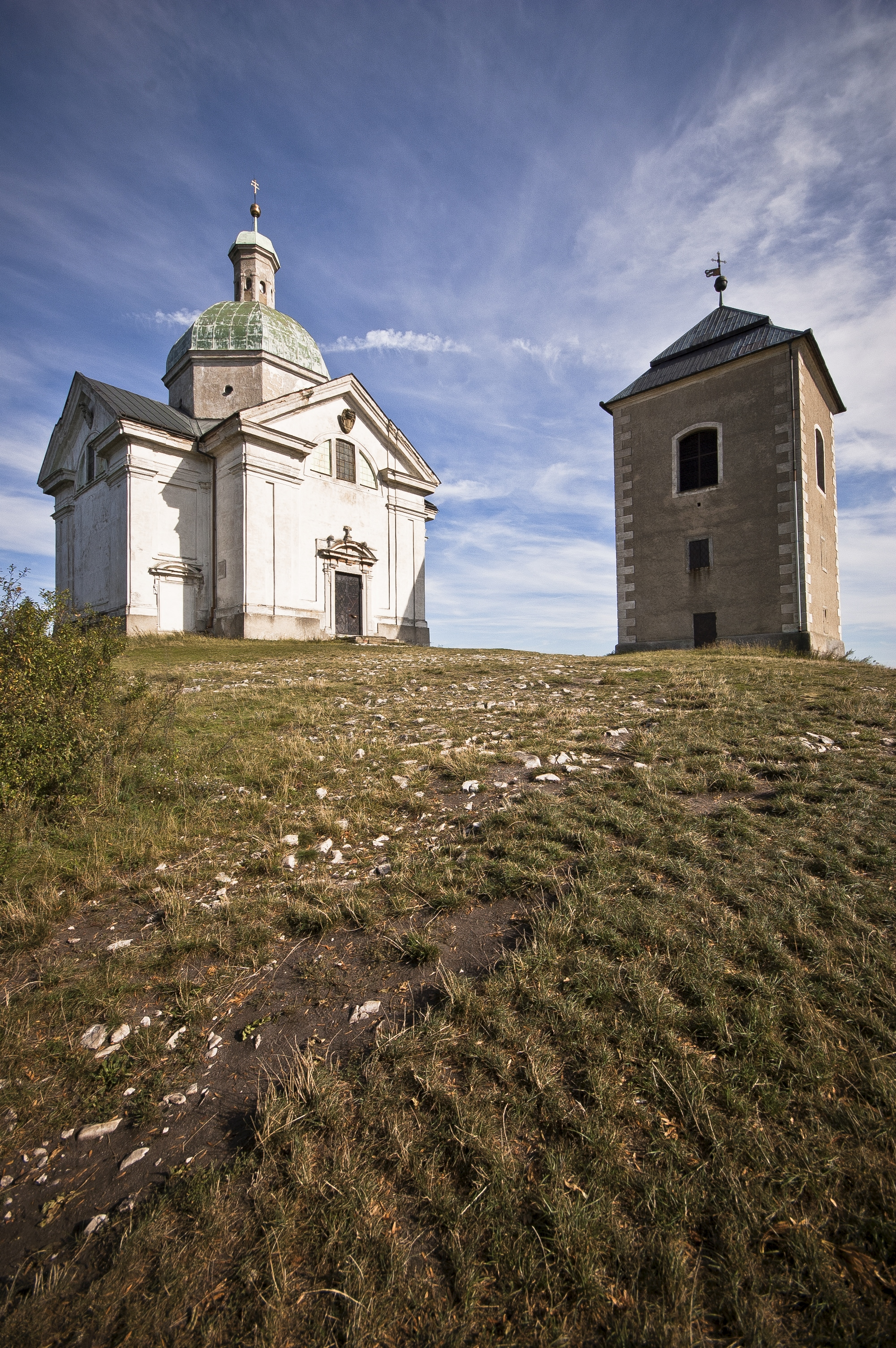 Svatý kopeček Mikulov